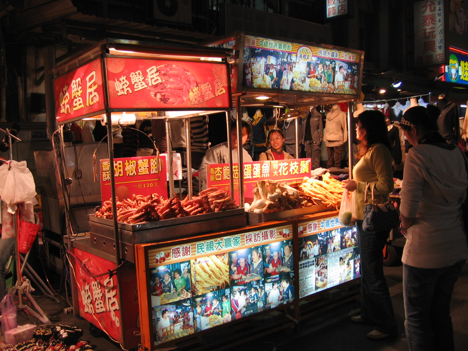 Liouho Night Market, Kaohsiung, Taiwan